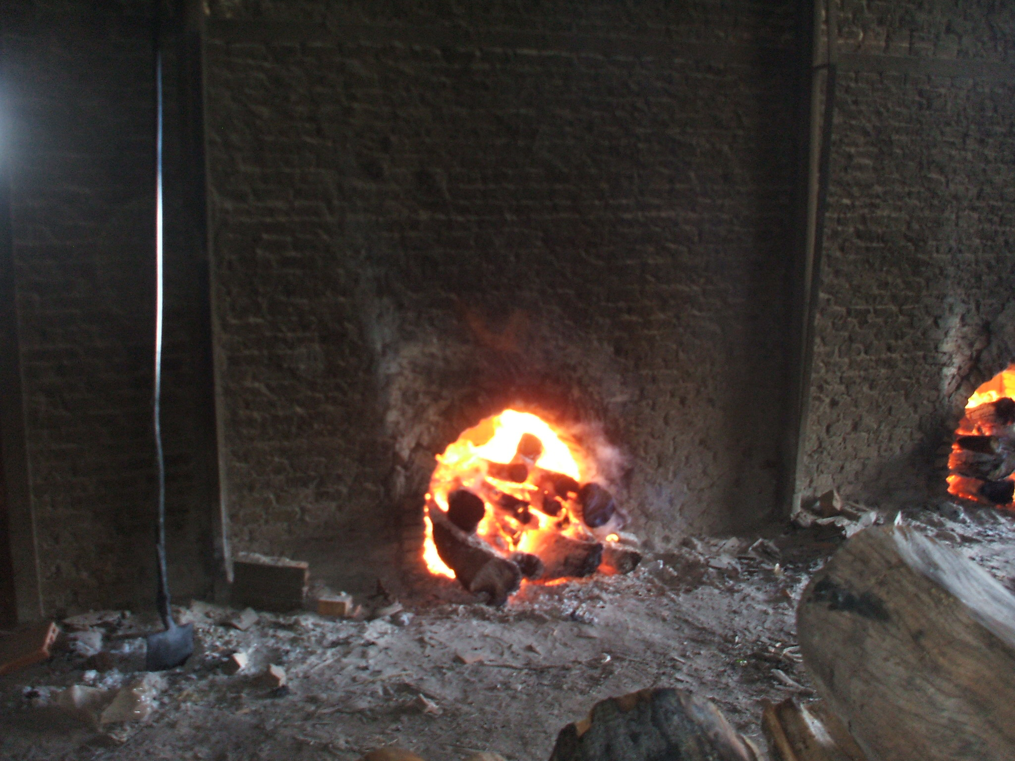 fachada